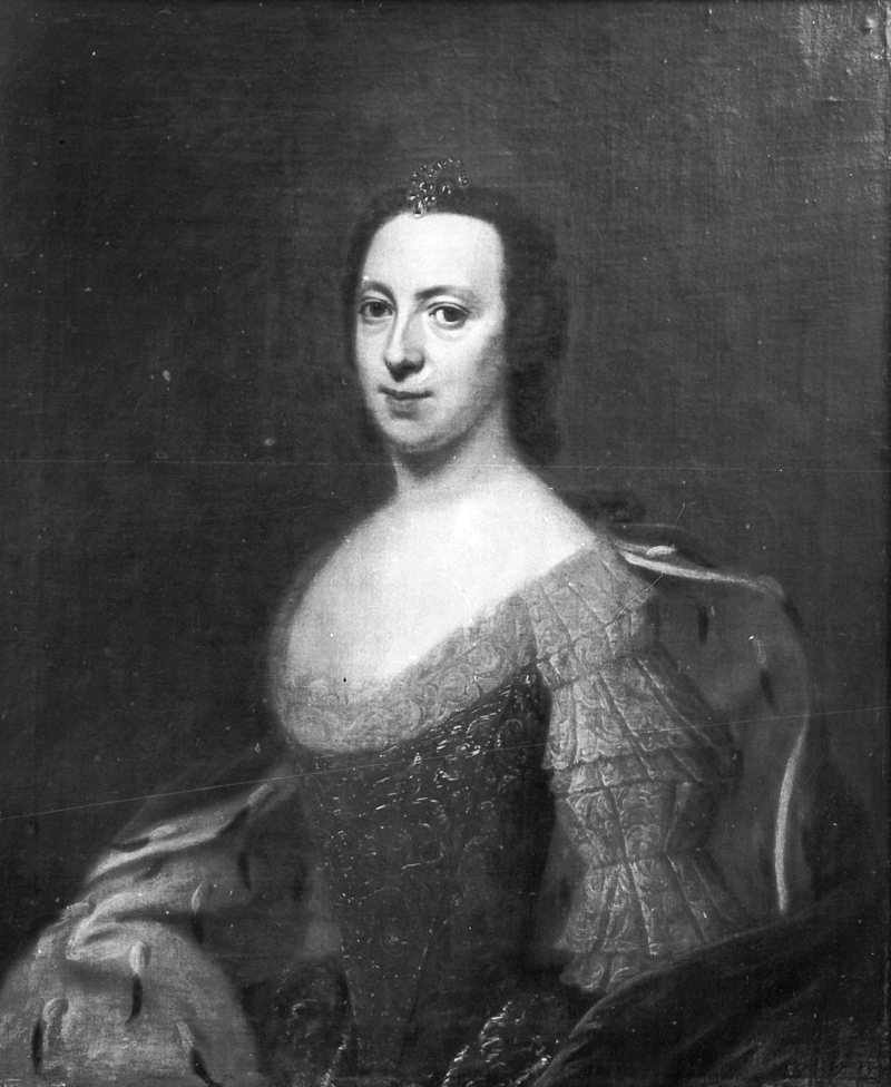 Sophie Charlotte de Schleswig-Holstein-Sonderbourg-Beck (1722-1763) épouse de Georges Louis de Holstein-Gottorp